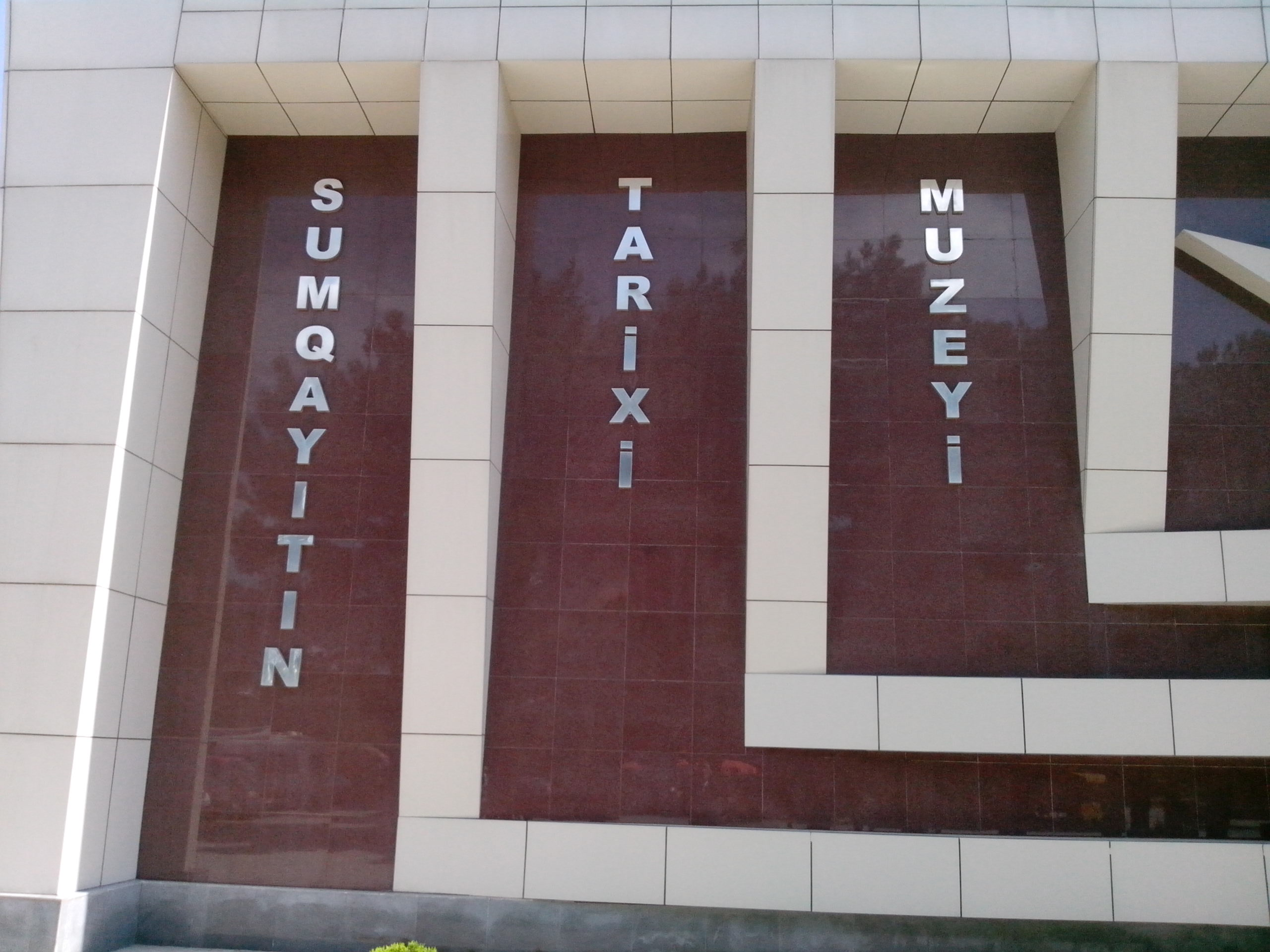 Sumqayıtın Tarixi Muzeyi